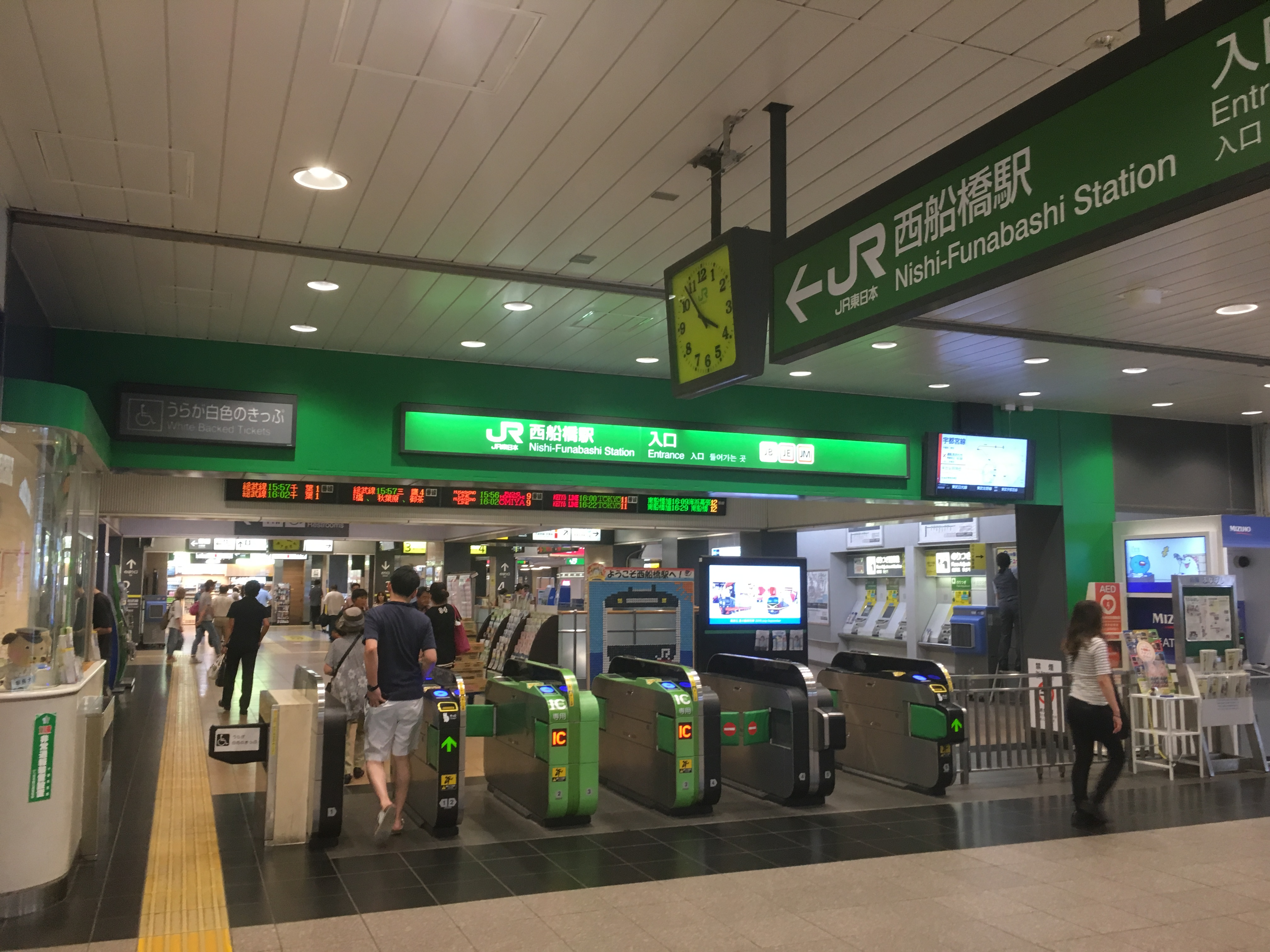 西船橋駅 (Nishi-Funabashi Station)